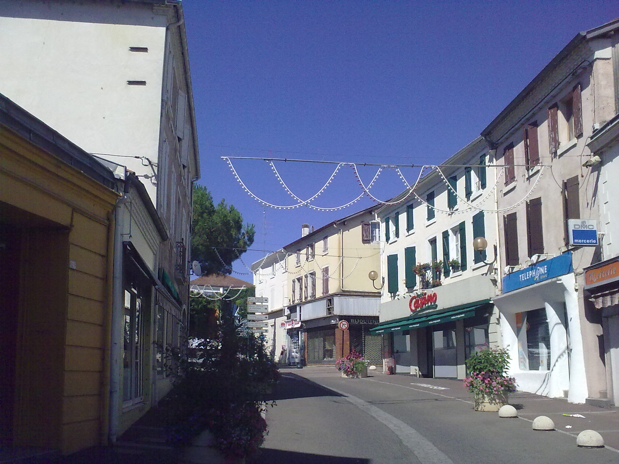 Hagetmau, centre ville le 18 juillet 2010, France.